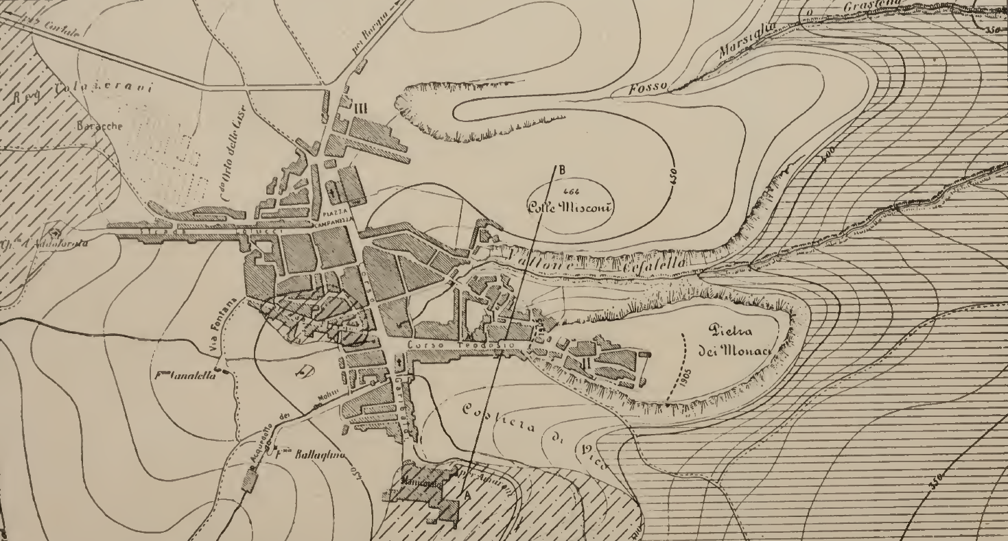 Cartina di Girifalco nei primi anni del '900 in una relazione successiva al terremoto del 1905.